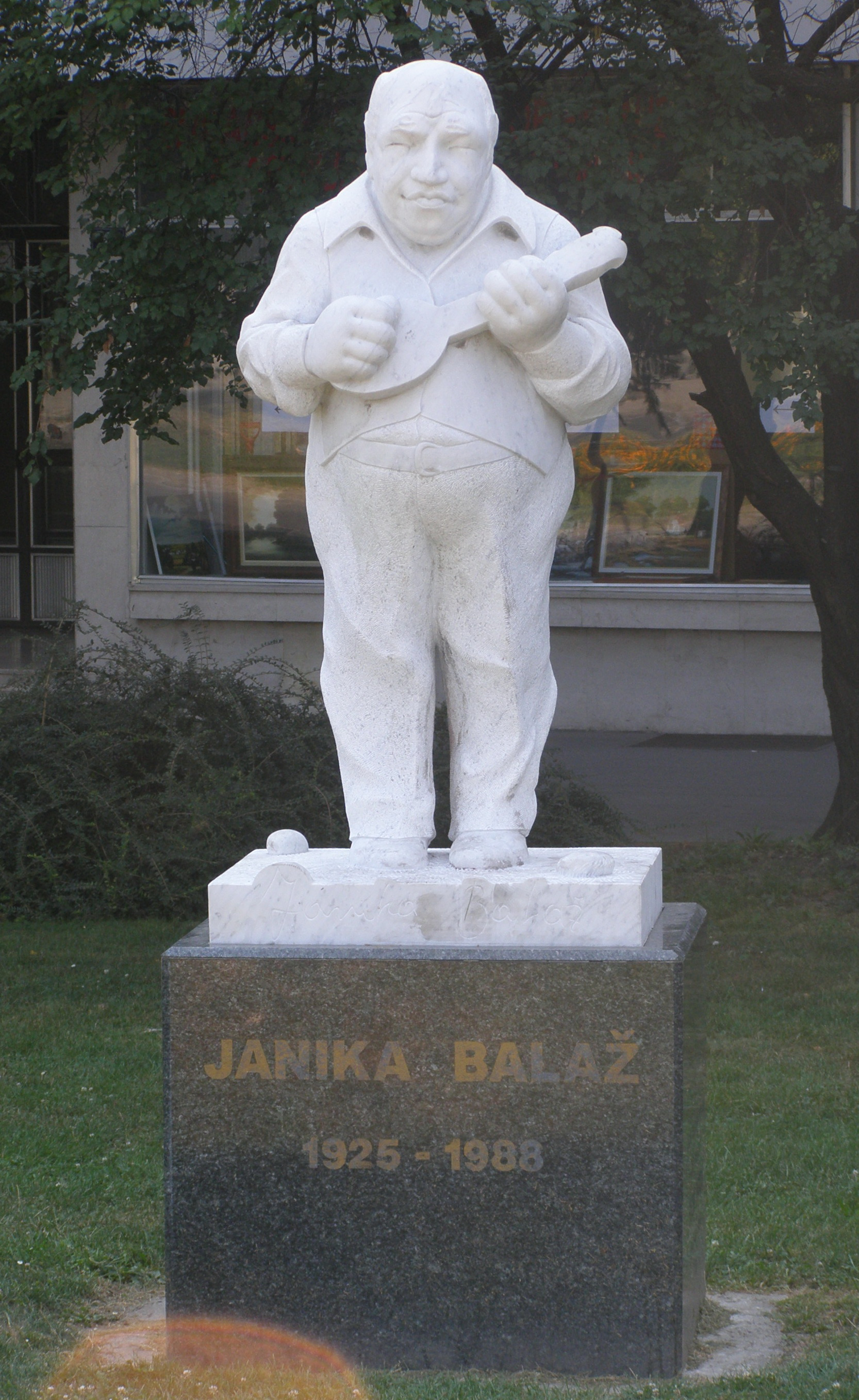 Janika Balaž monument in Novi Sad, Serbia